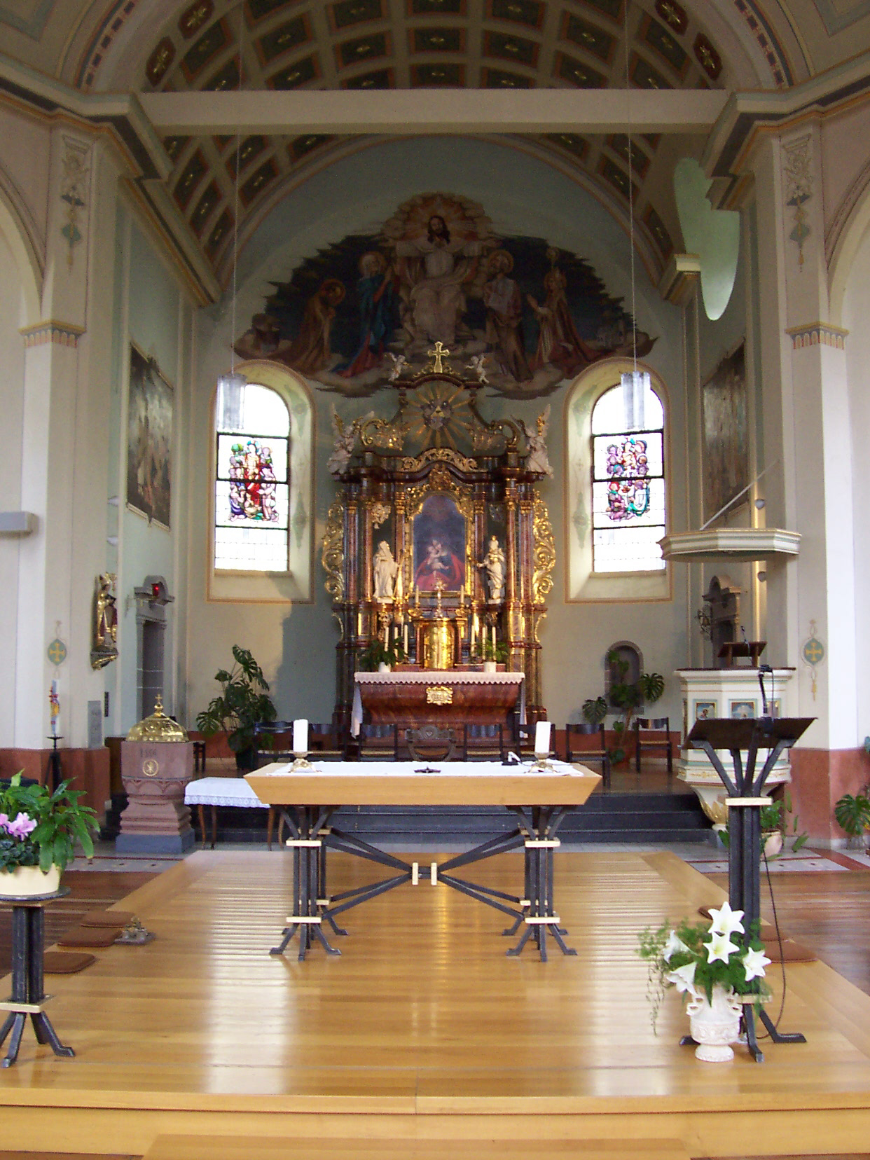 Pfarrkirche Innenansicht